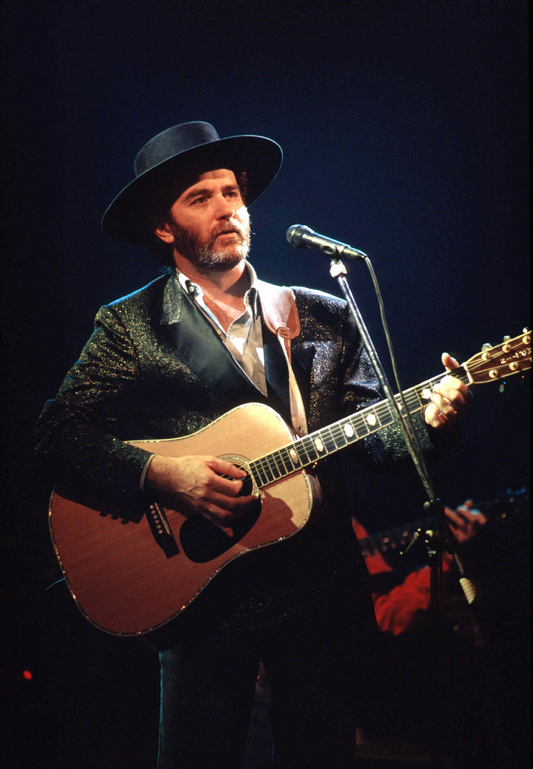 Il cantautore italiano Francesco De Gregori